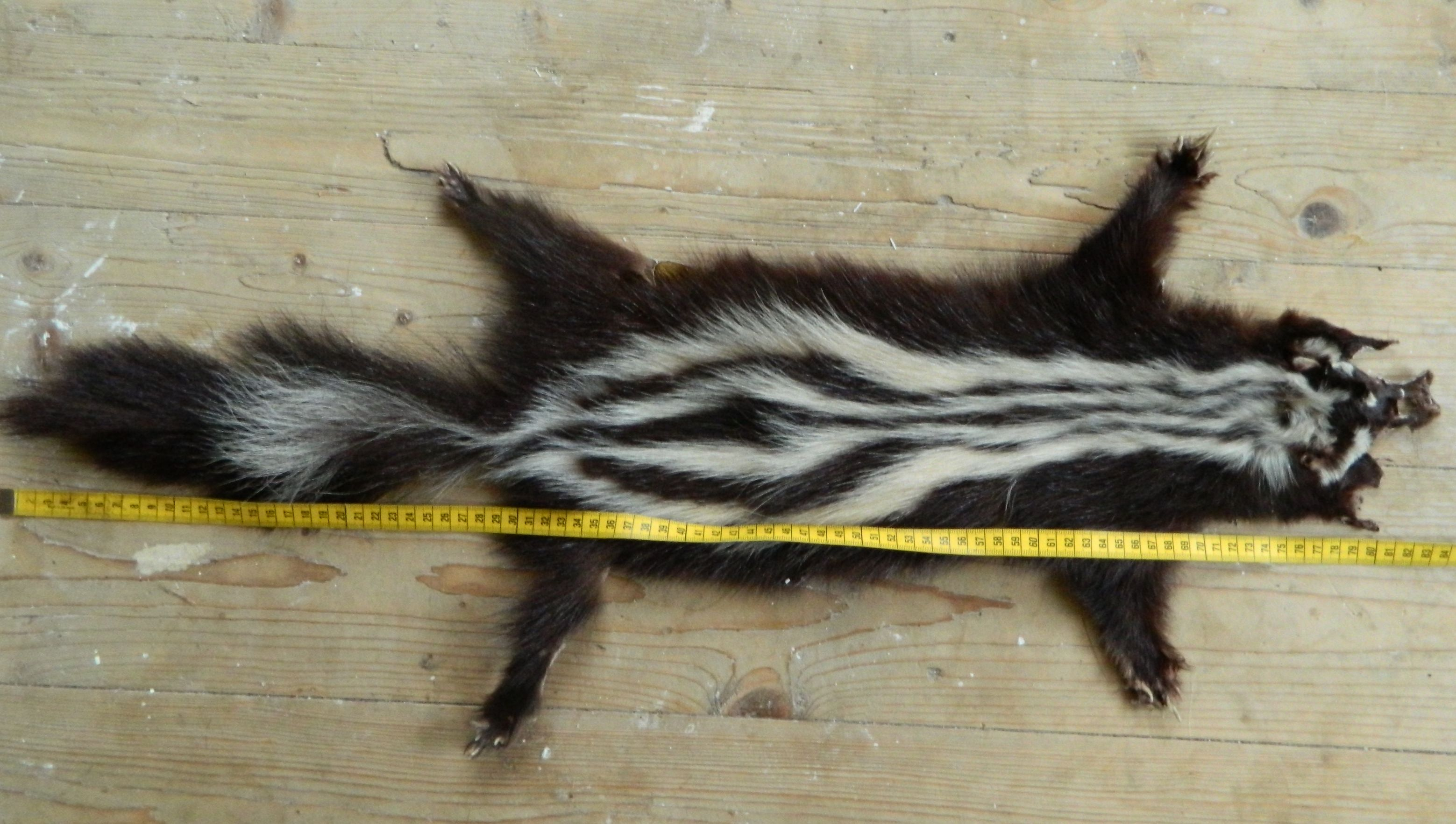 Zorilla-Fell (Bandiltis). In Privatbesitz.